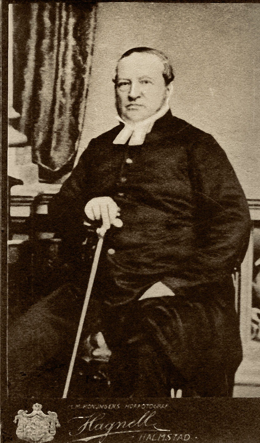 Gustav Leonard Dahl, 1801-1877